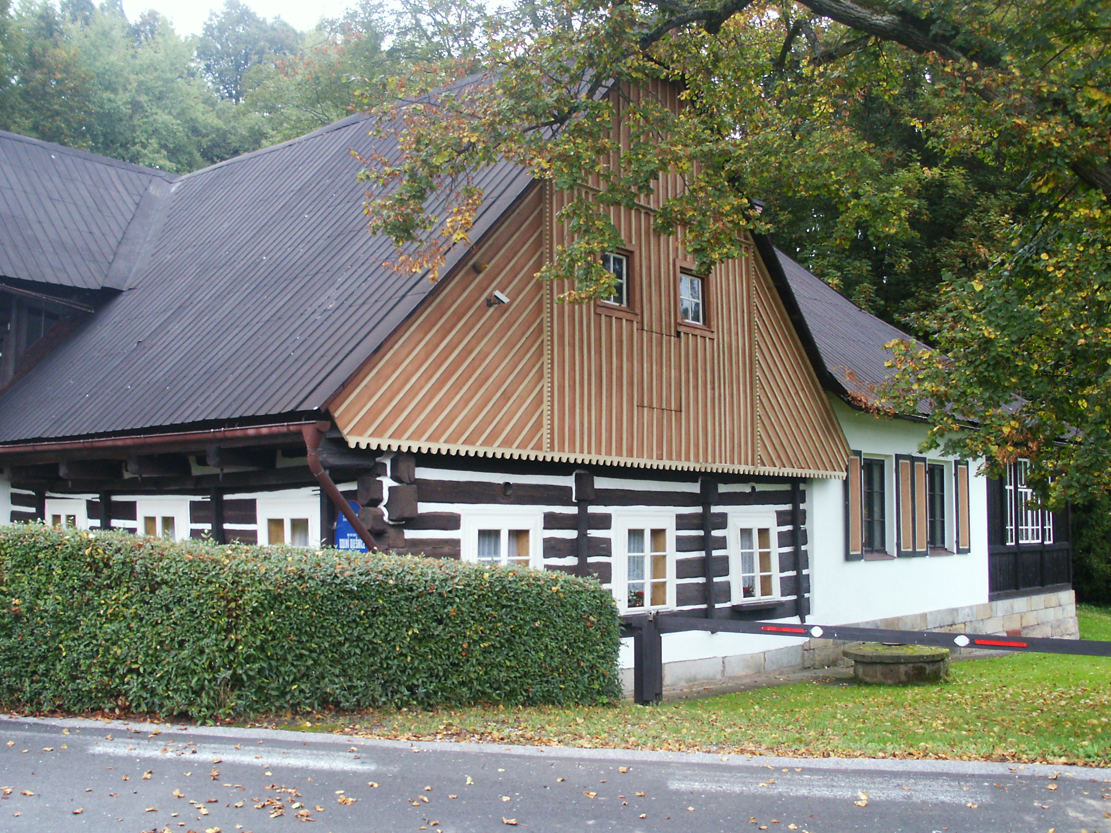 Venkovský dům - býv. hostinec (Dolní Olešnice), Vestřev 99